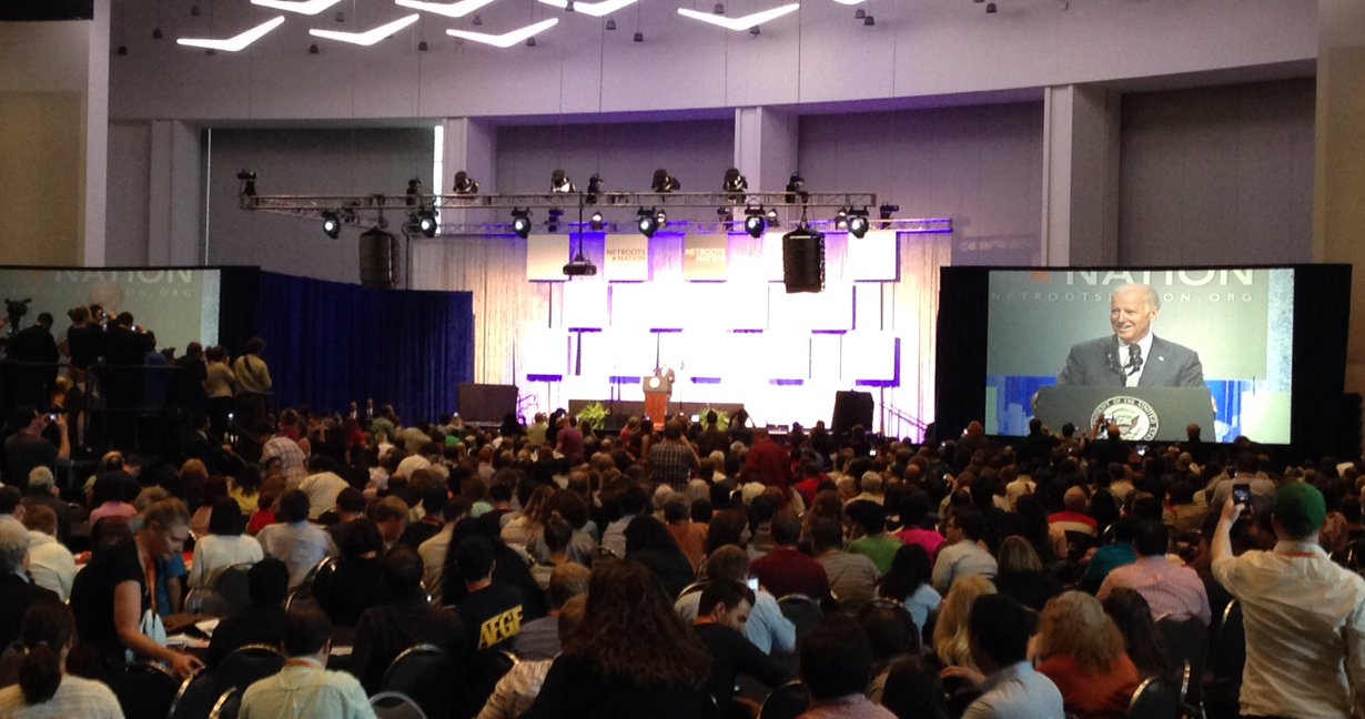 Joe Biden speaking at Netroots Nation in Detroit, 2014